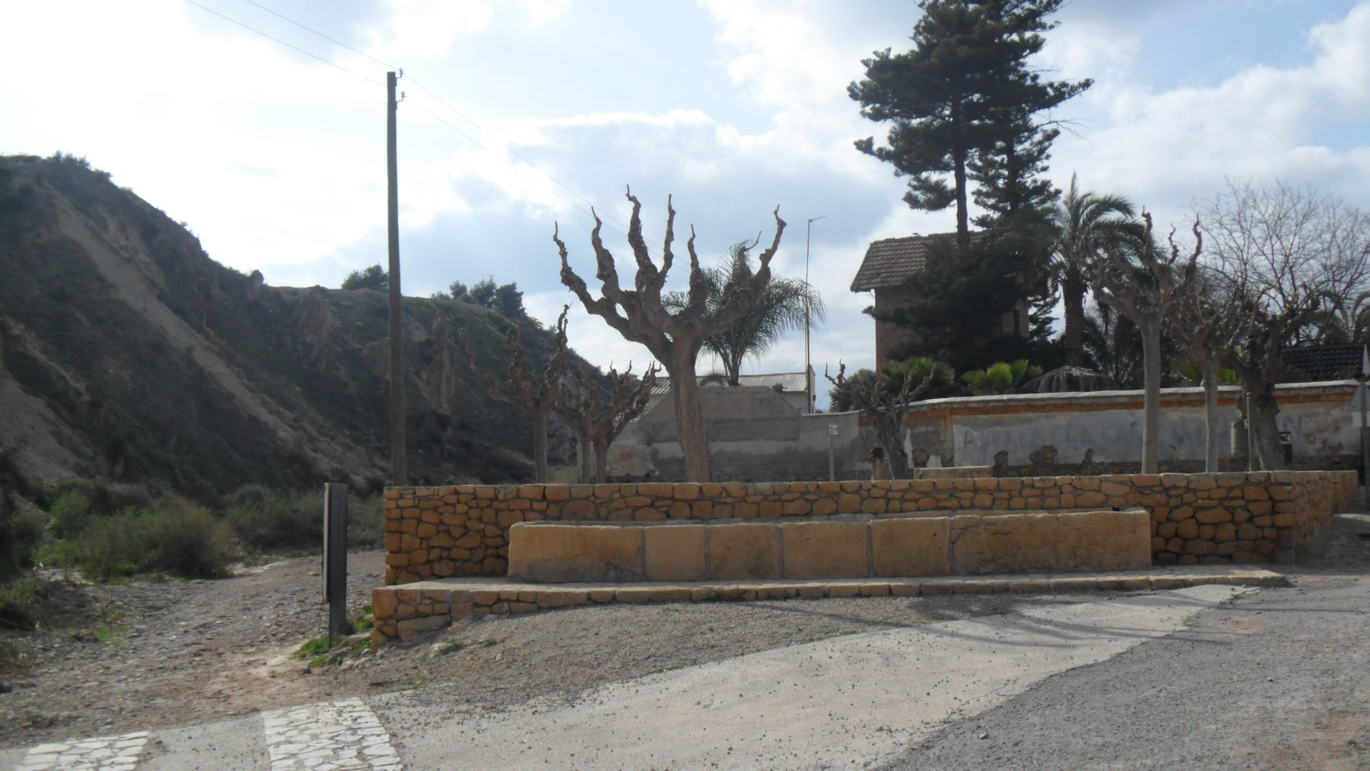 Imagen del Cañico de Totana.